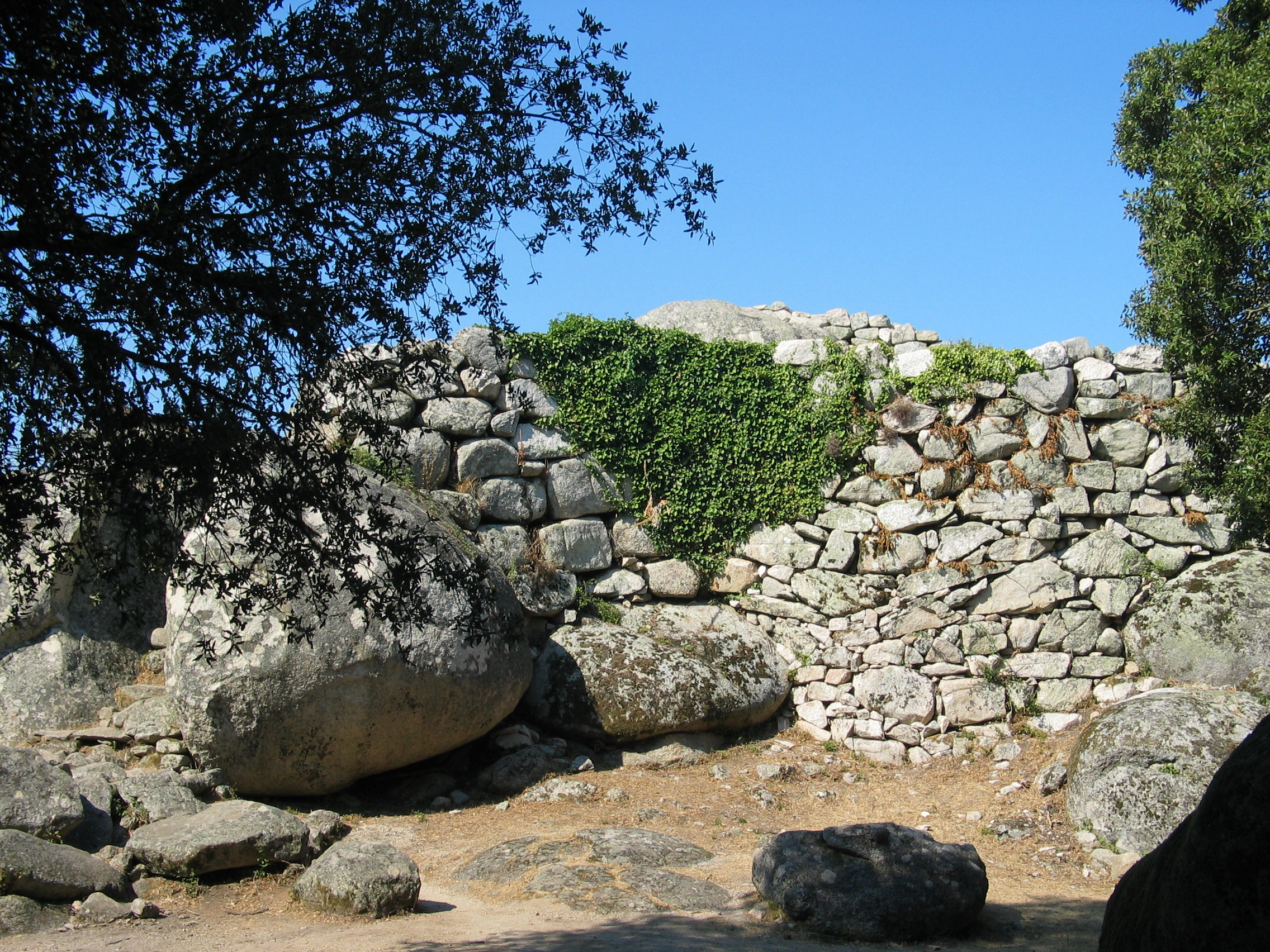 Cucuruzzu, site préhistorique en Corse-du-Sud